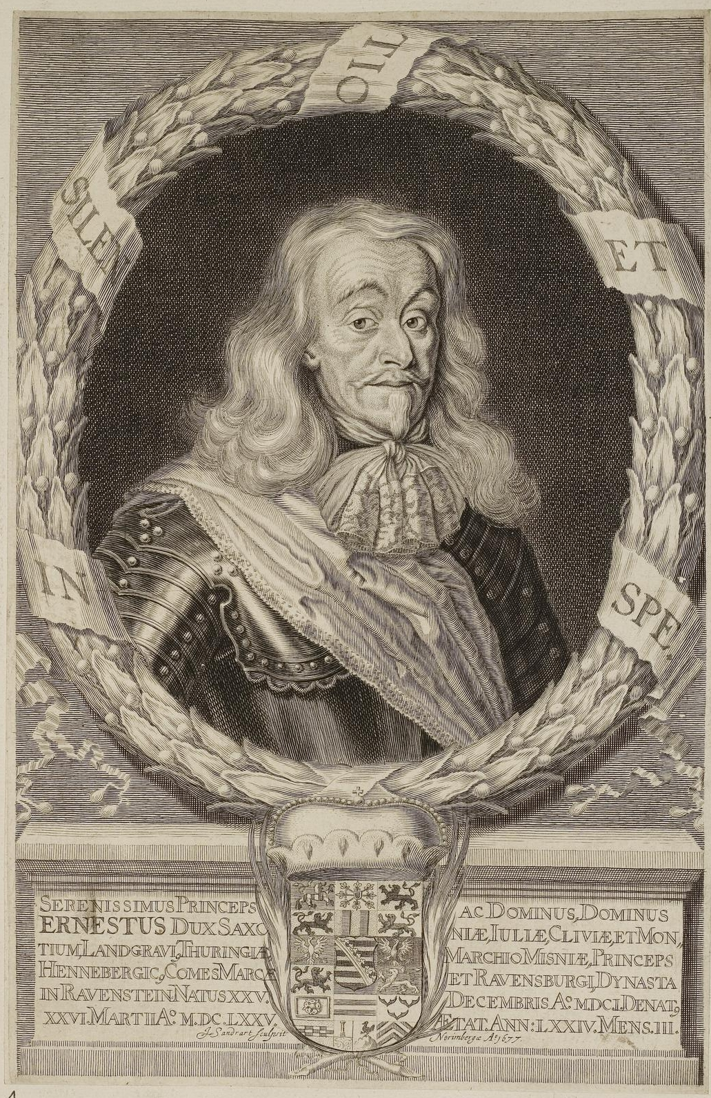 Grafik aus dem Klebeband Nr. 1 der Fürstlich Waldeckschen Hofbibliothek Arolsen Motiv: Ernst I. von Sachsen-Gotha-Altenburg